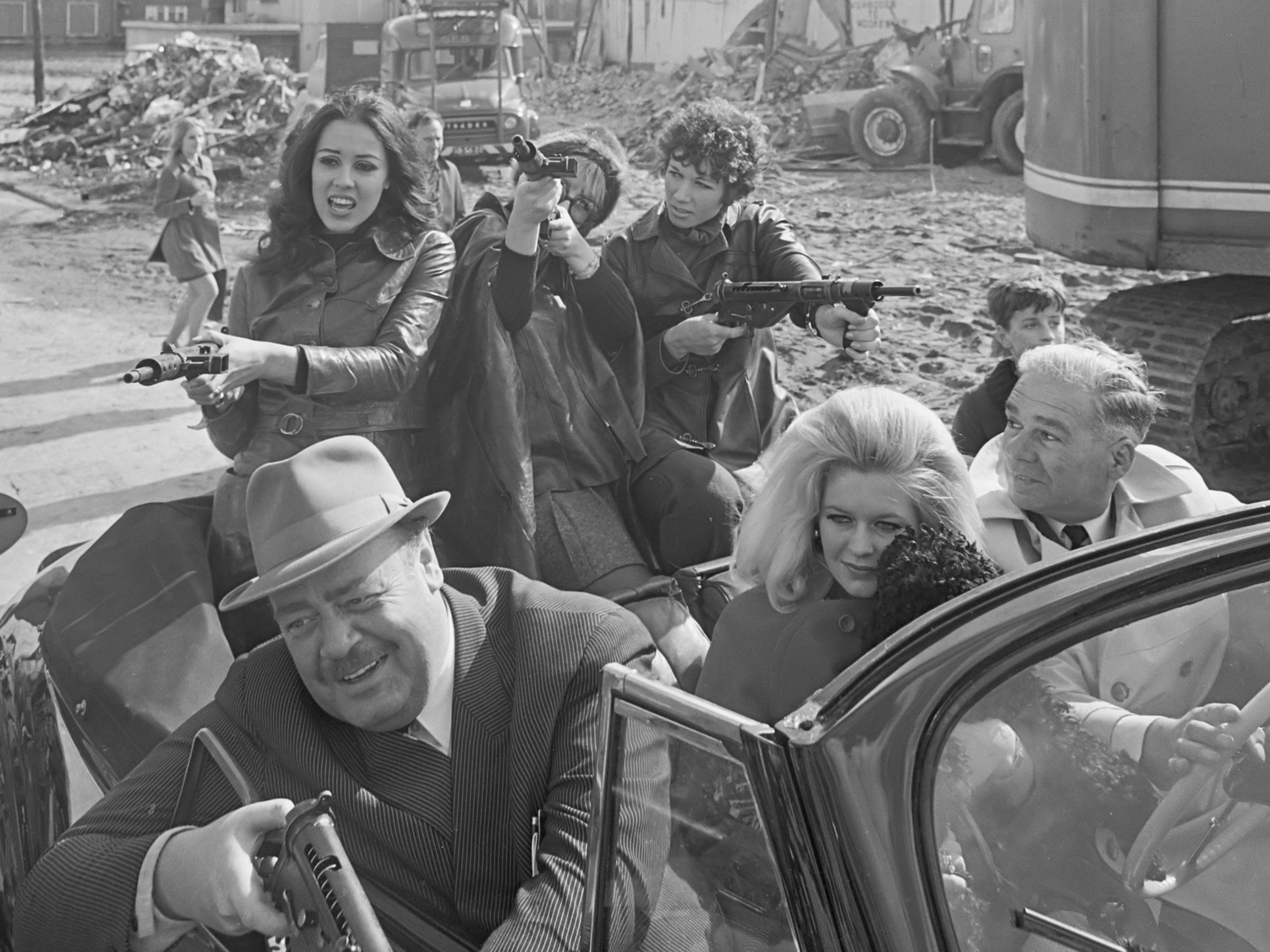 Moef Ga Ga in Kattenburg (Amsterdam), de beatmeisjes met stenguns en "Pistolen Paultje" (Paul Wilking) in oude Packard 22 maart 1968